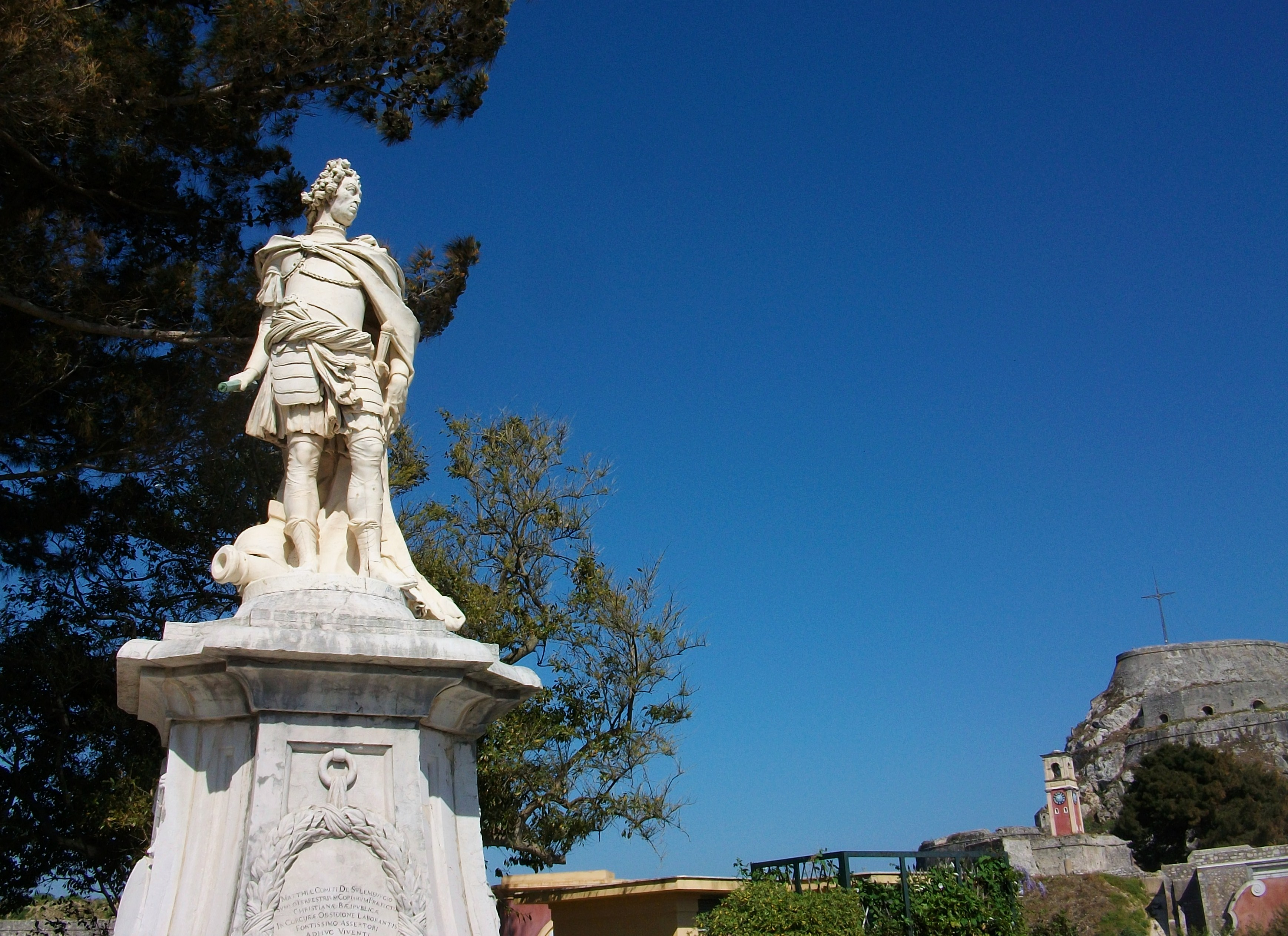 Estàtua de Johann Matthias von der Schulenburg a Corfú.